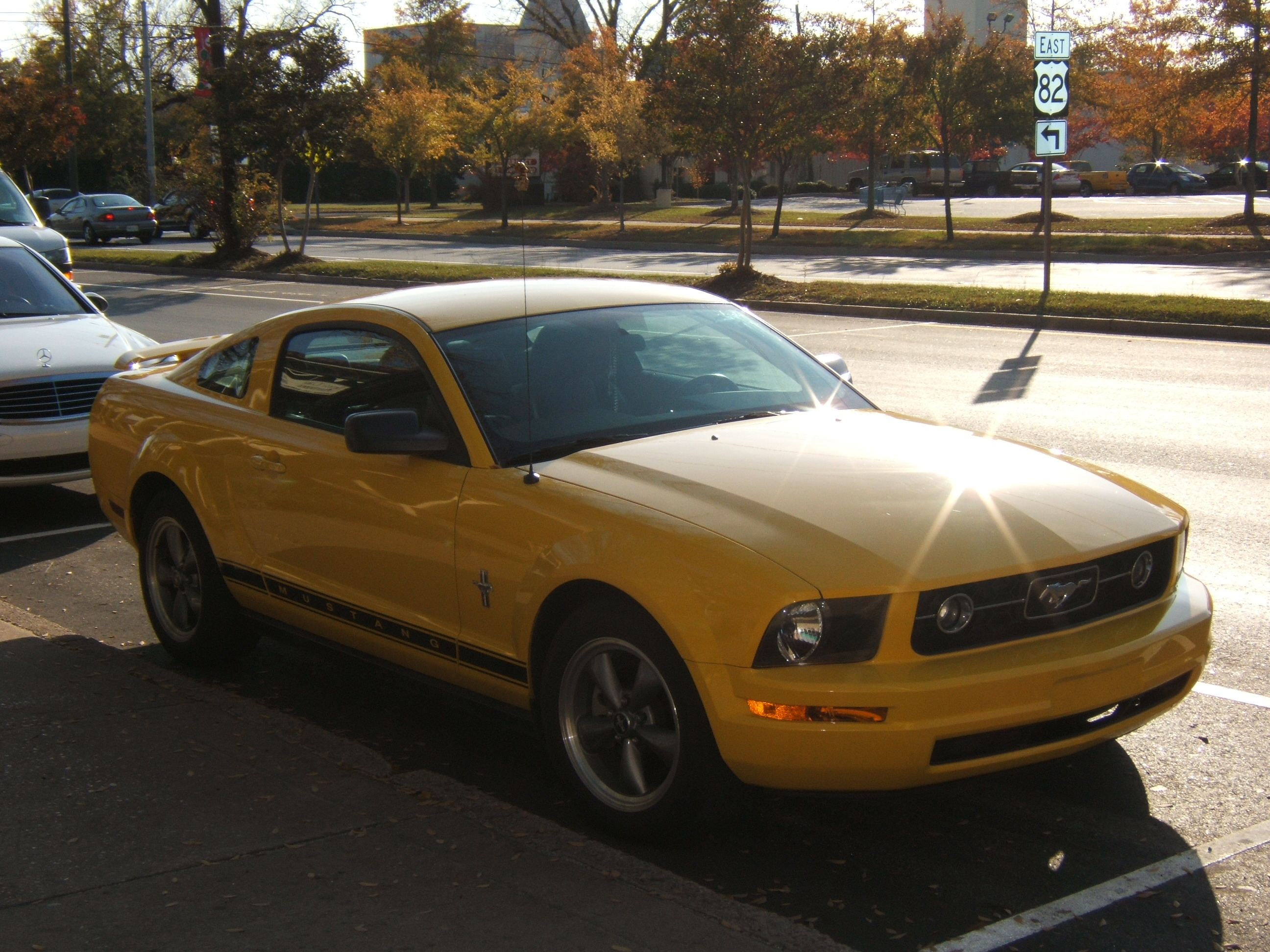 Ford Mustang 2007